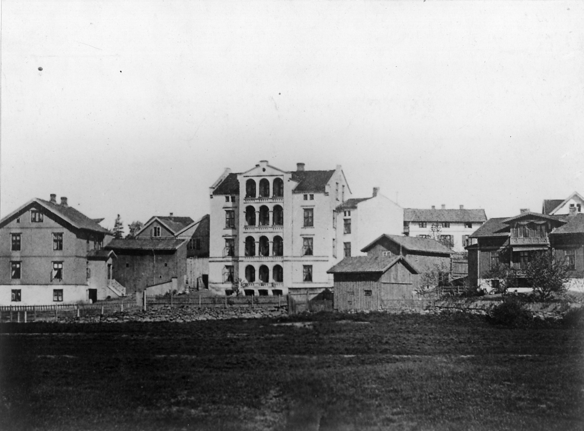 Jordet mellom Professor Dahls gate og Eilert Sundts gate. I midten er Professor Dahls gate 18, sett i nordvestlig retning fra Eilert Sundts gate. Huset til venstre for dette er Uranienborgveien 29. Husene til høyre er Professor Dahls gate 19 og 16. Ukjent fotograf (ca. 1875). Fra Byhistorisk samling hos Oslo Museum.